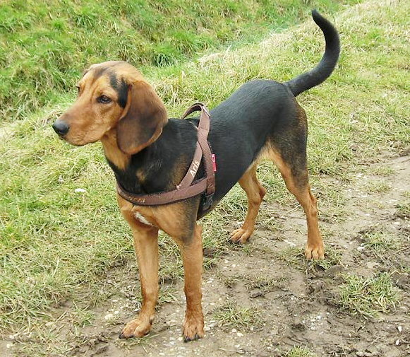 Hellinikos Ichnilatis, auch: Griechische Bracke